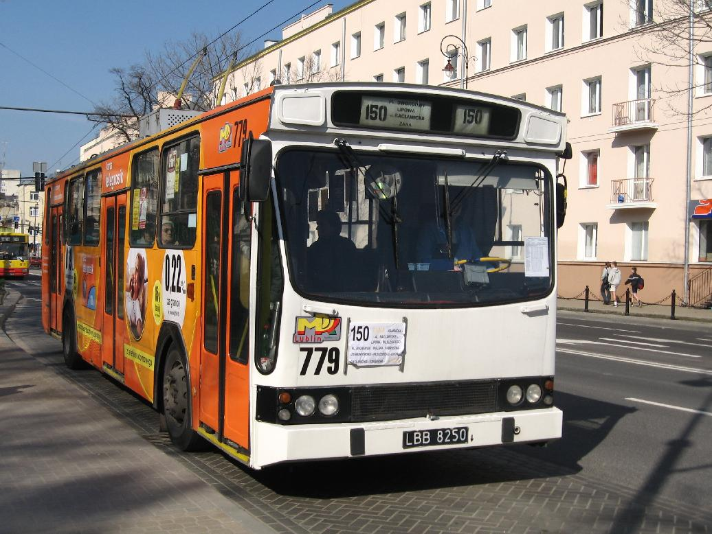 Trolejbus v Aleji Piłsudského v Lublinu